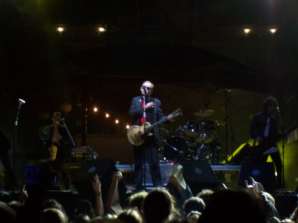 Concerto de Siniestro Total Festa de inauguração da FNAC Corunha